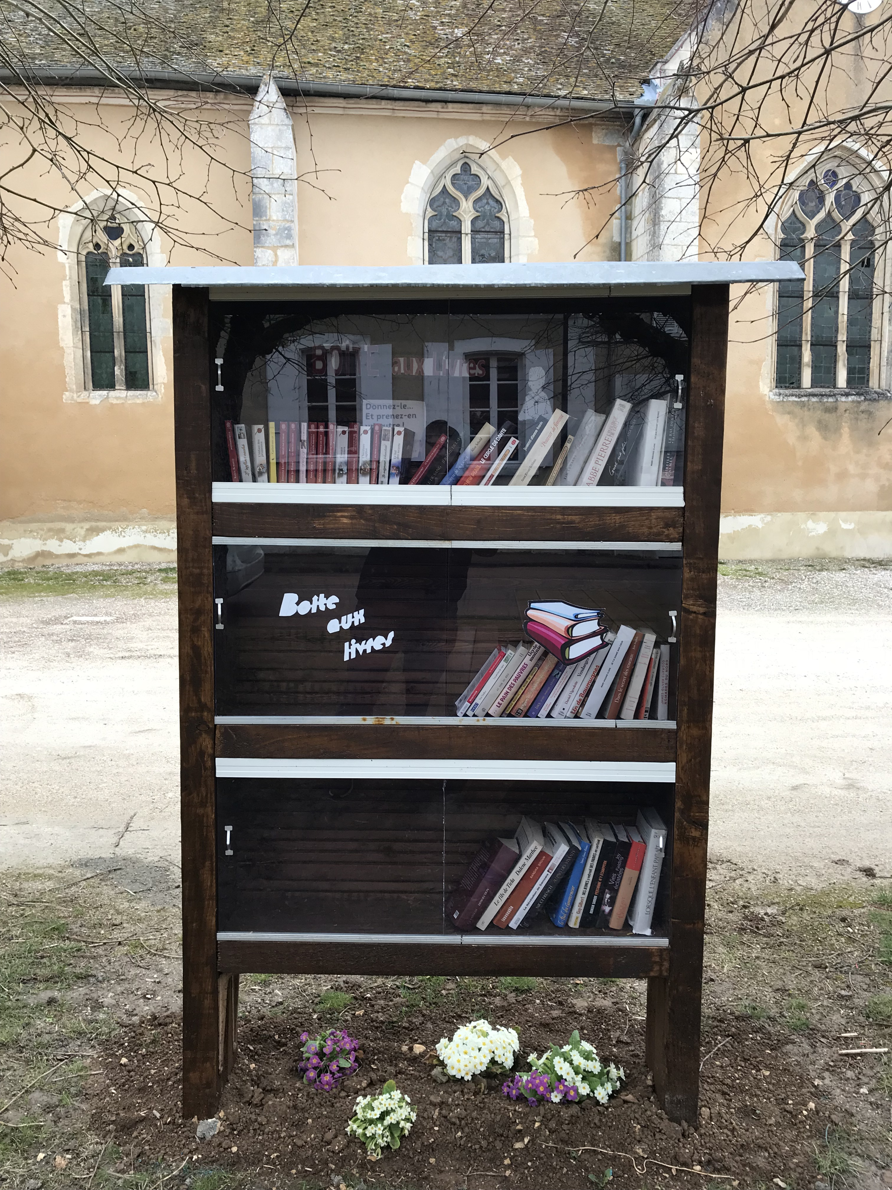 Boîte à livres de Sougères-en-Puisaye, Yonne, France